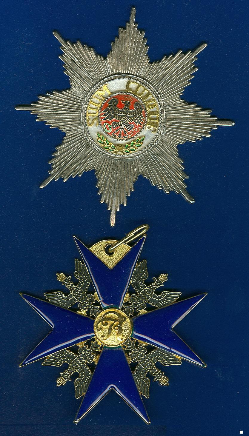 Ster en kruis uit mijn eigen verzameling. Zelf gescand. Het ontwerp is uit de 18e eeuw en er rust geen copyright meer op. Robert Prummel 26 mei 2006 00:42 (CEST)